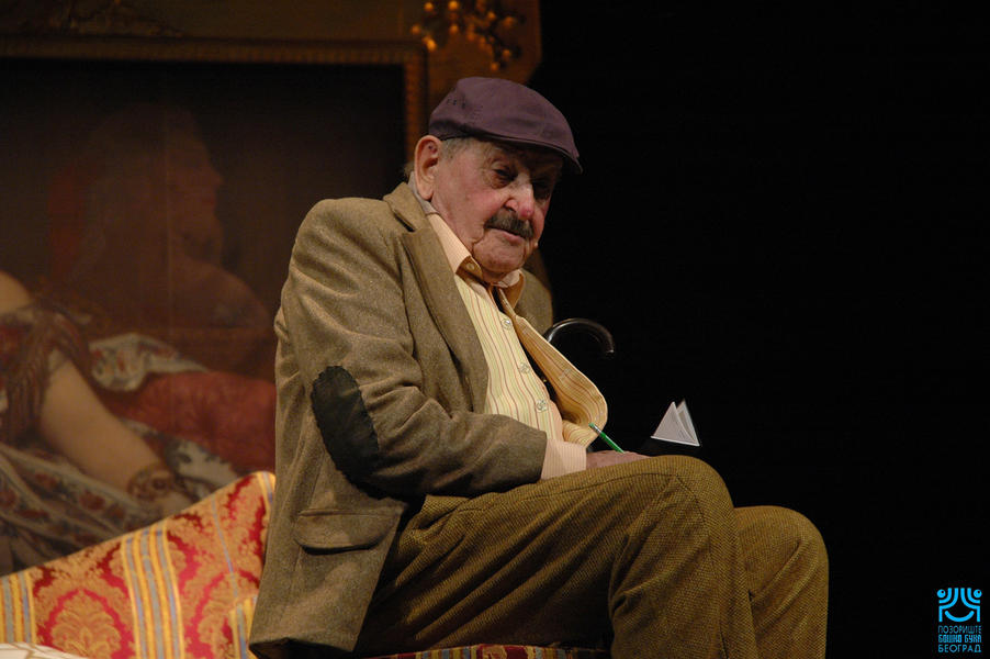 Српски (ћирилица): Сцене са премијере позоришне представе "Госпођа Министарка" у извођењу ансамбла позоришта Бошко Буха. На слици Власта Велисављевић.